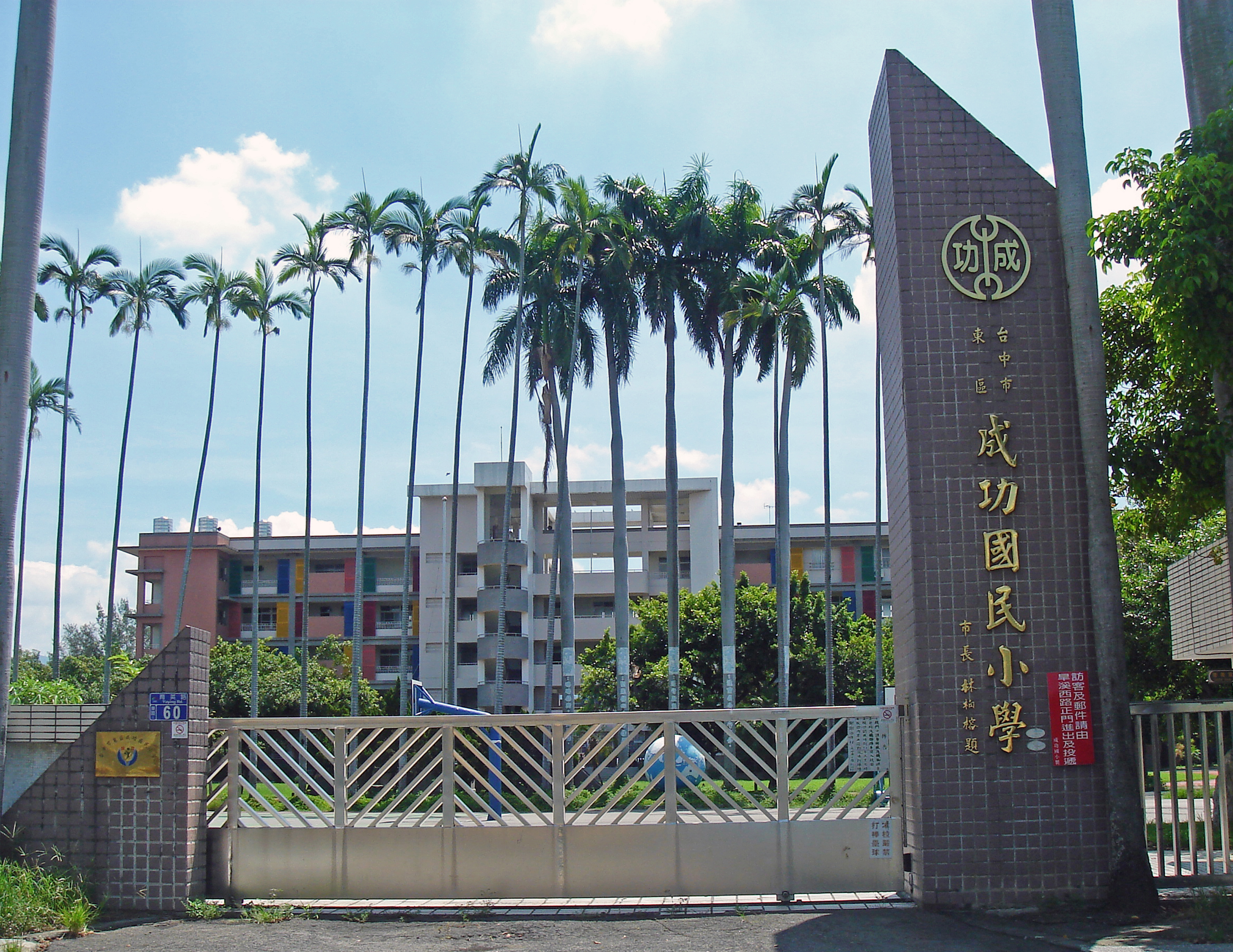 台中市東區成功國民小學舊校門。